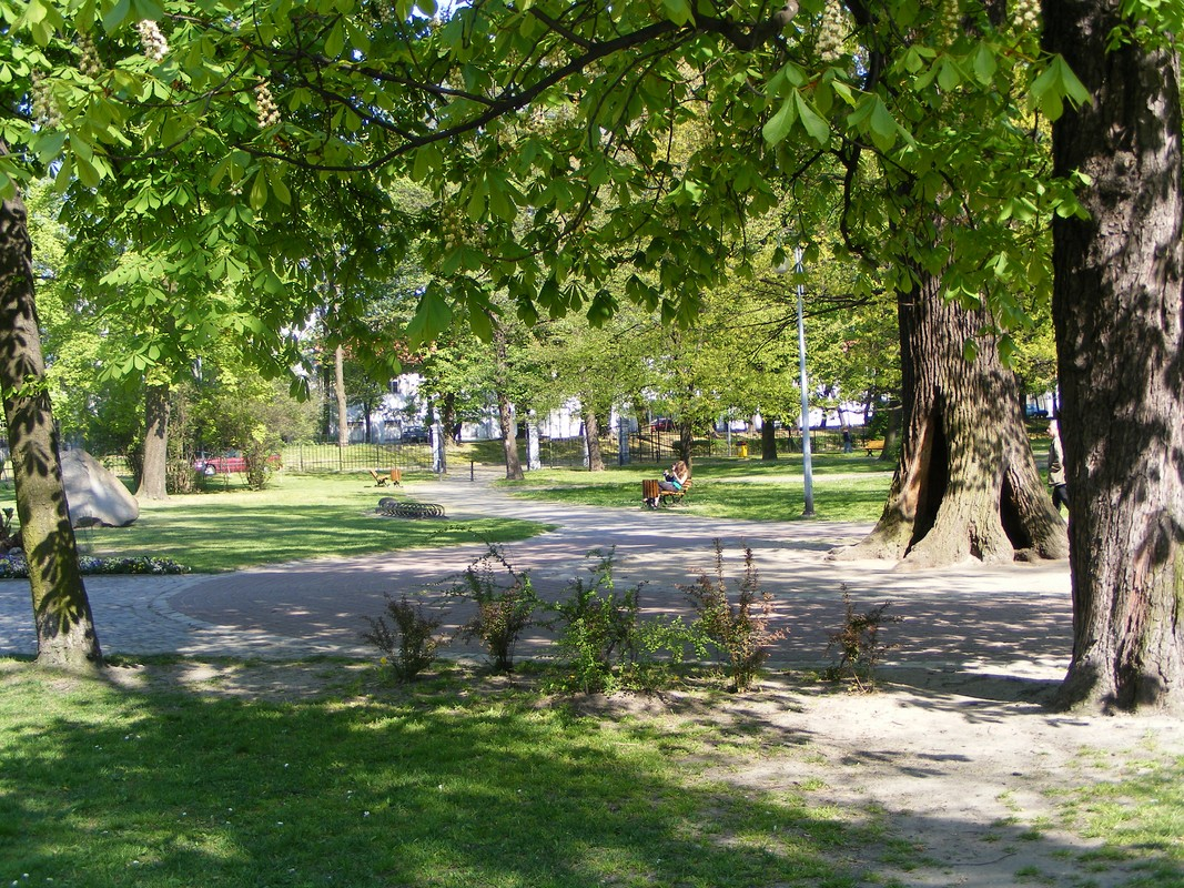 PARK CHOPINA.